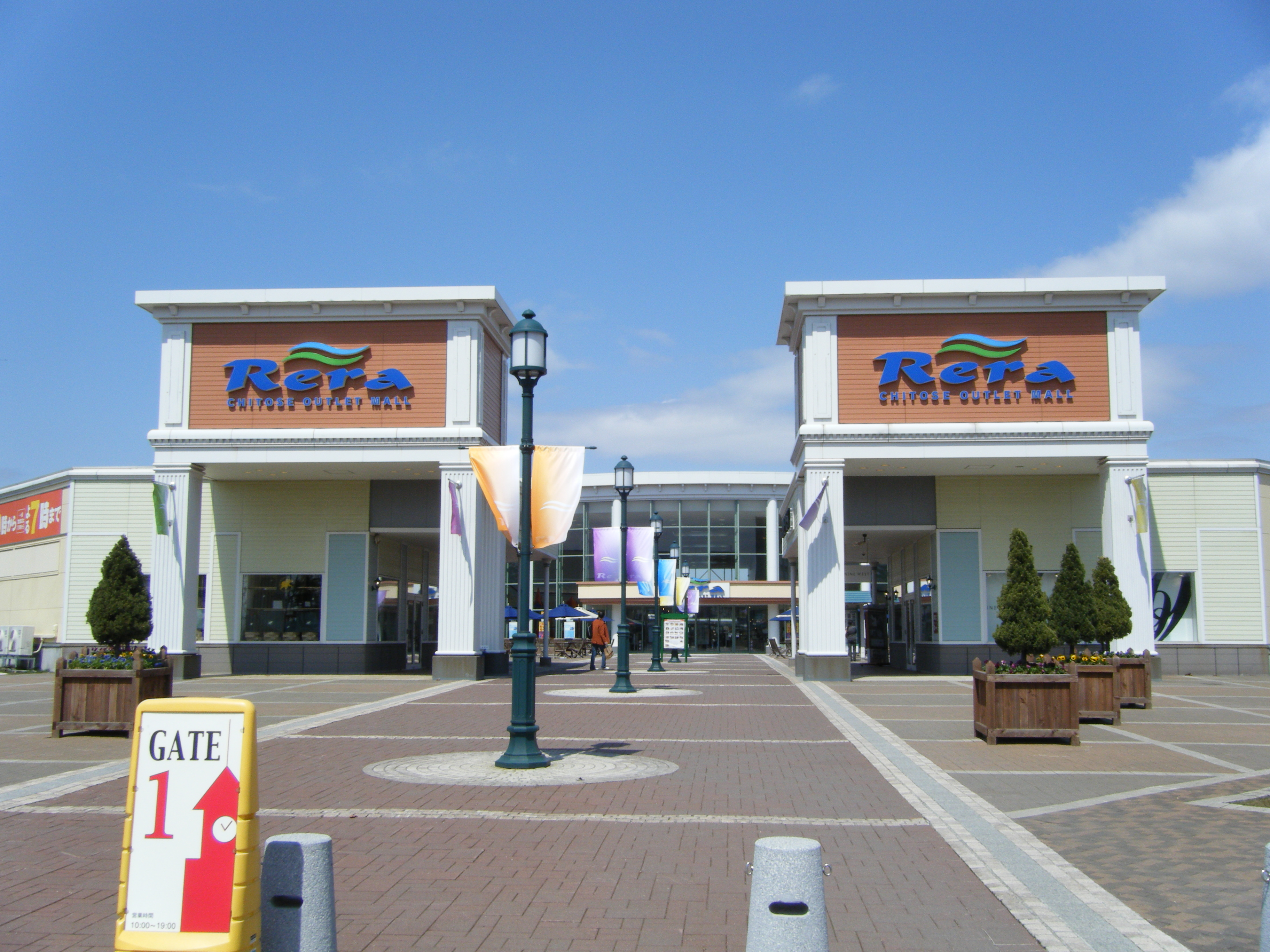 北海道千歳市。千歳アウトレットモール・レラの玄関。